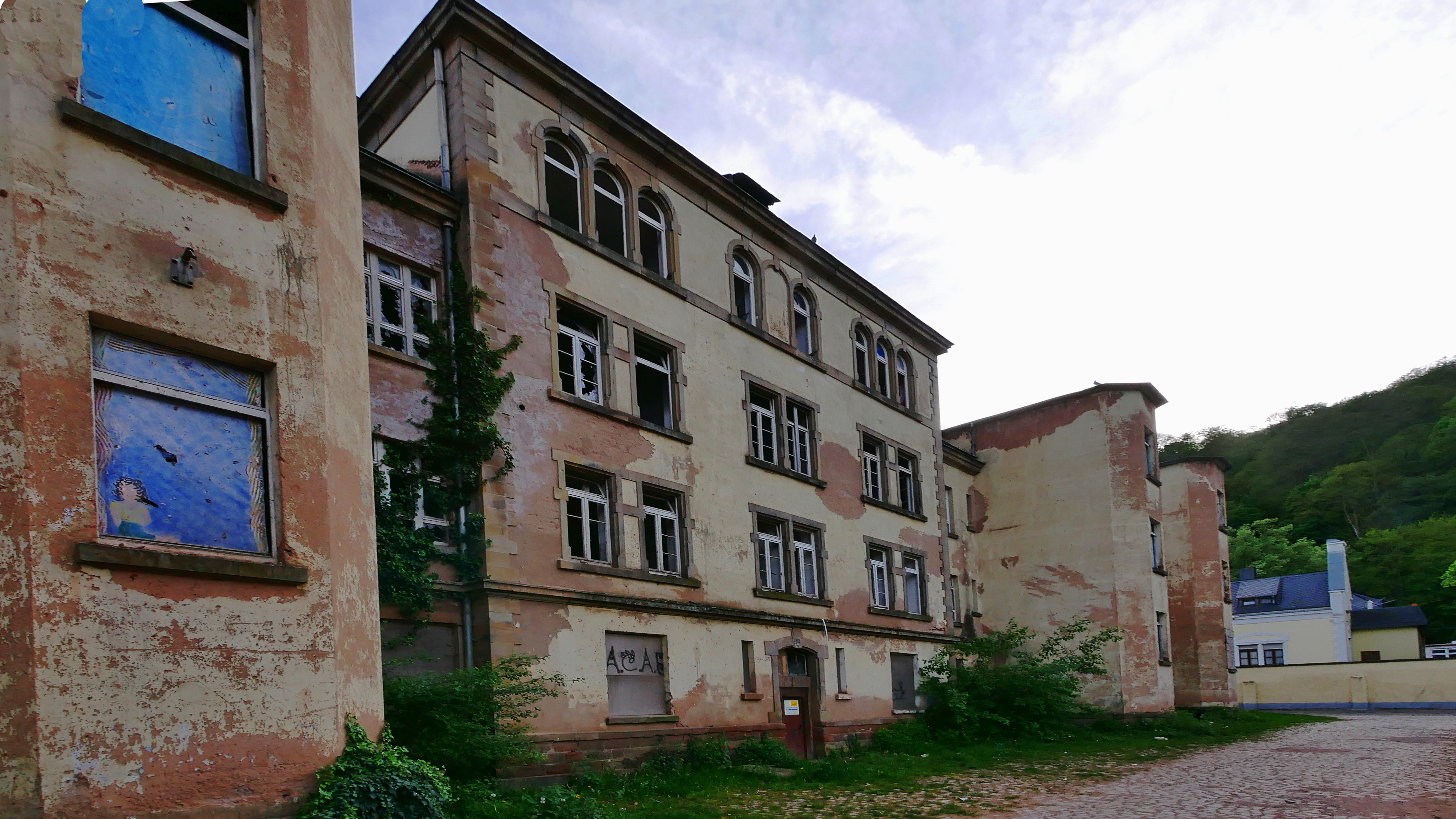 Gneisenau Kaserne (Städtische Kaserne) Trier. Mittleres Gebäude an der Gneisenaustraße